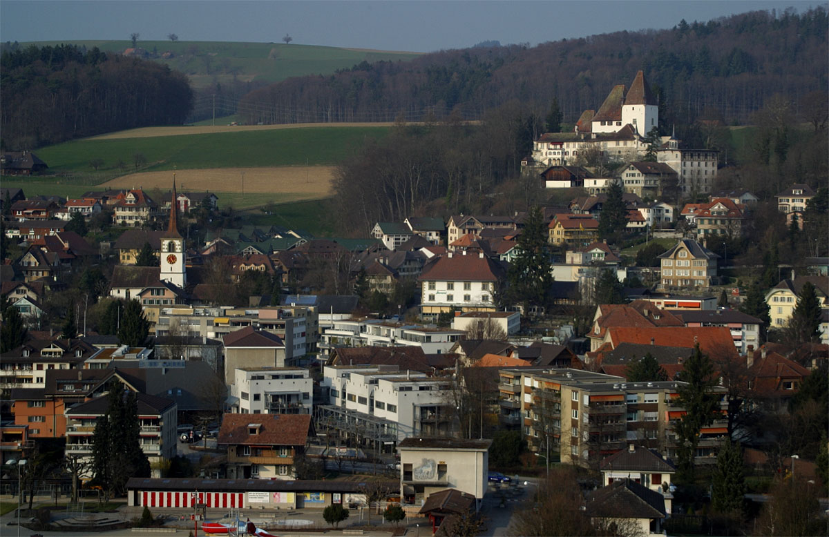 Ansicht von Worb